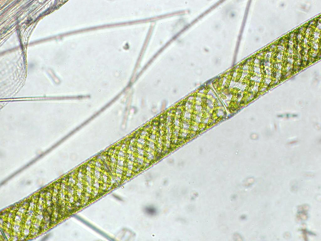 Spirogyra sp. (Zygnematales) / Tanabe City, Wakayama Pref. Japan